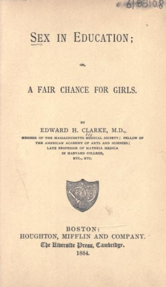 Antifeministisch boek door Edward H. Clarke